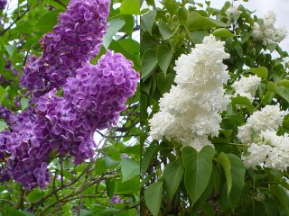 Lila och vit syren Syringa vulgaris. Foto Olof Ekström 2004